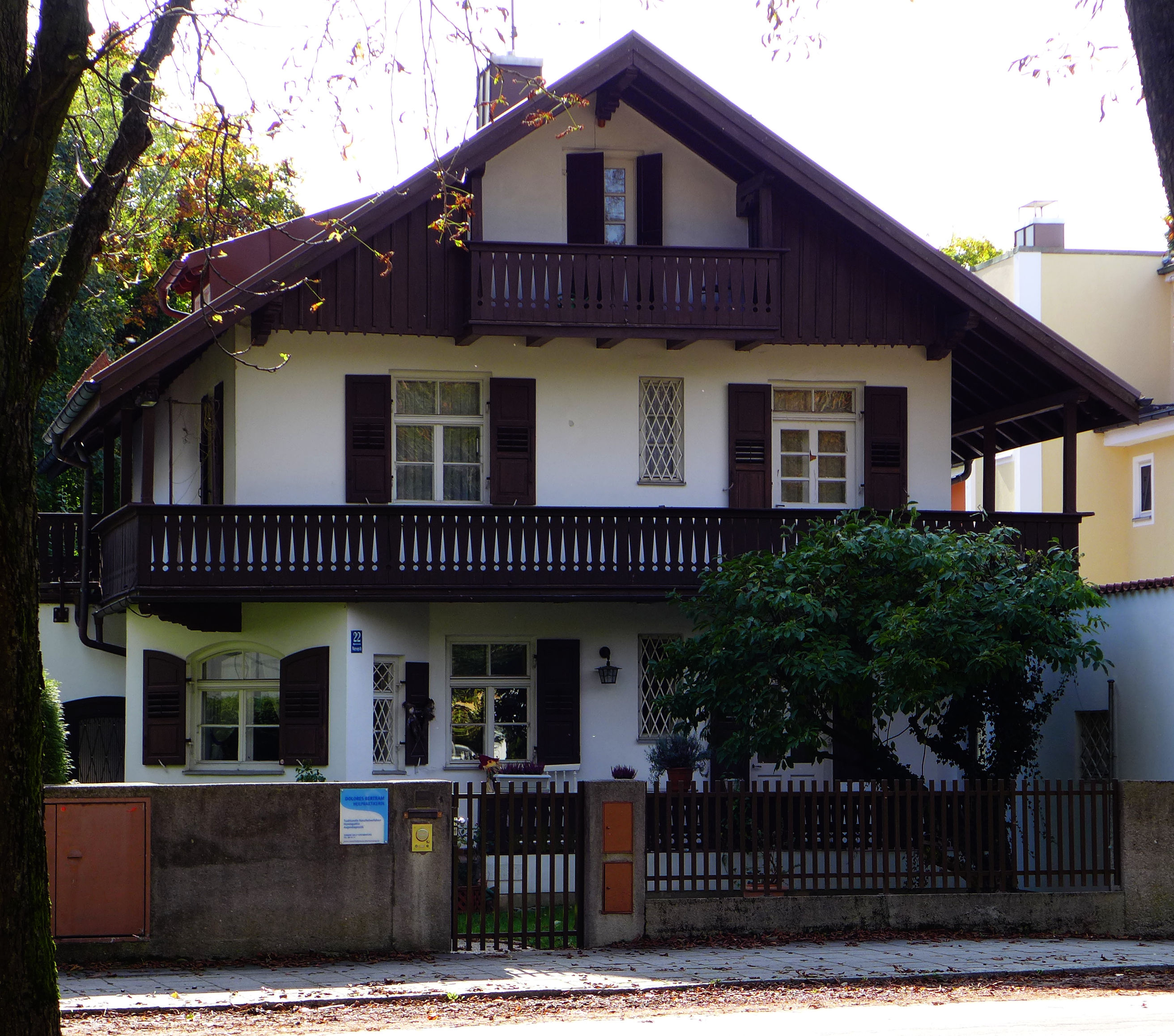 Marsopstr 22, München